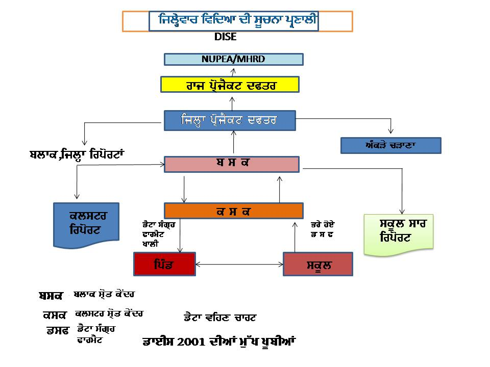 ਪੰਜਾਬੀ: ਇਹ ਤਸਵੀਰ ਡੀ ਆਈ ਐਸ ਈ ਡਾਈਸ ਦੀ ਵਿਆਖਿਆ ਕਰਦੀ ਹੈ.। This picture describes District Information System for School Education used in India.